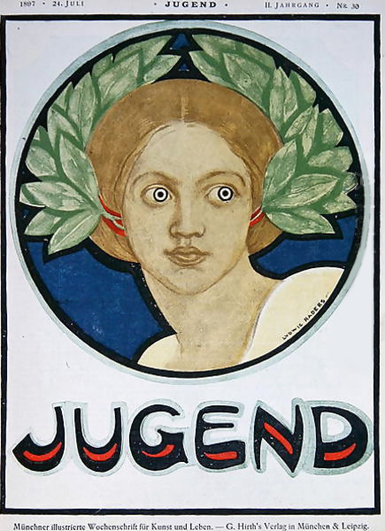 Ludwig Raders - Jugend Nr. 40, 1897